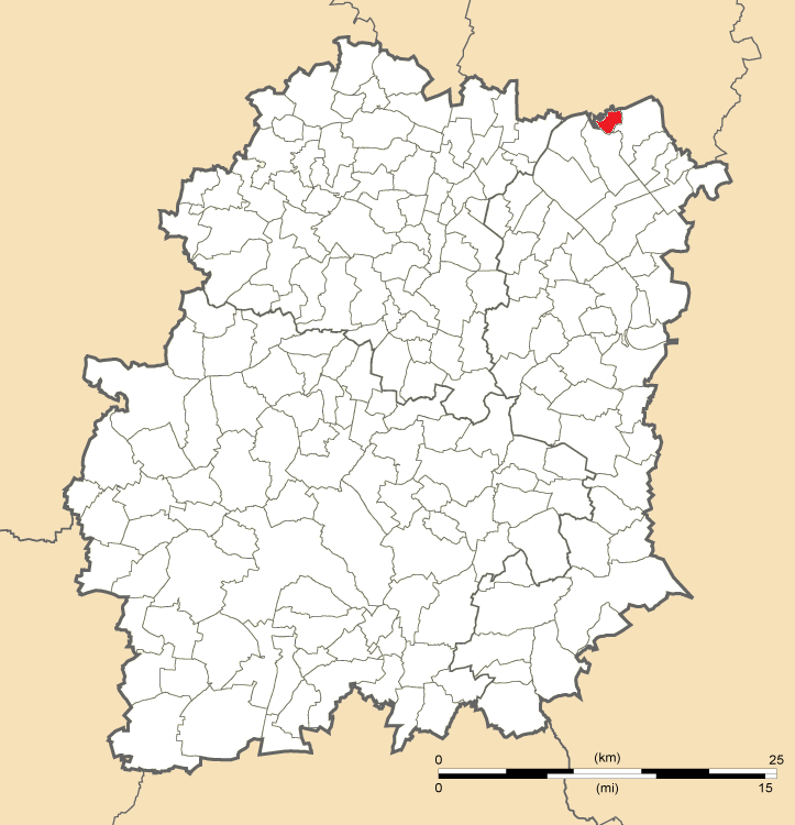 Carte de position de Crosne en Essonne